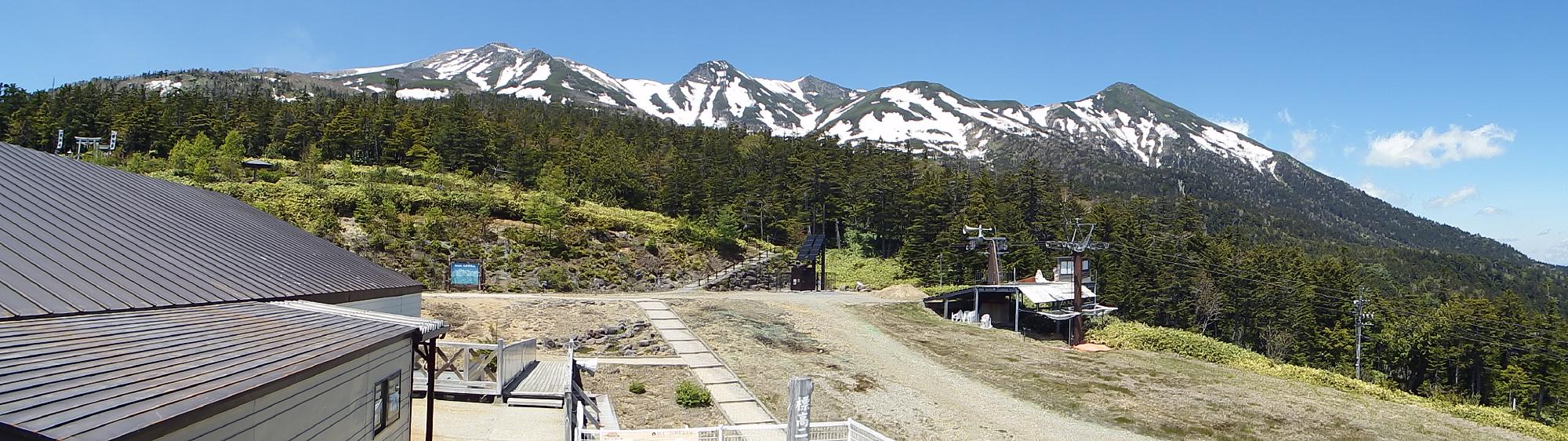 御岳ロープウェイ飯森駅